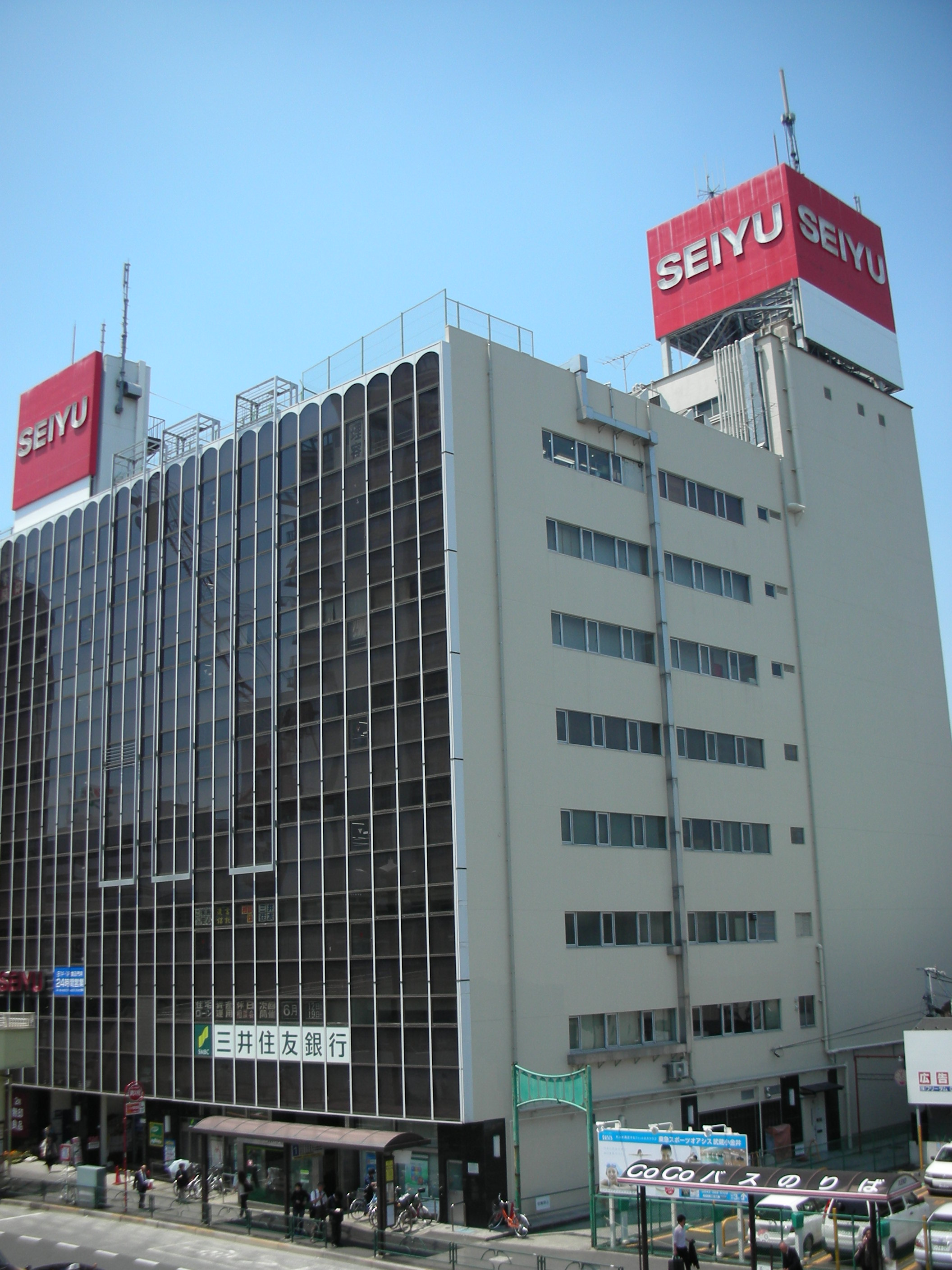 西友小金井店の外観